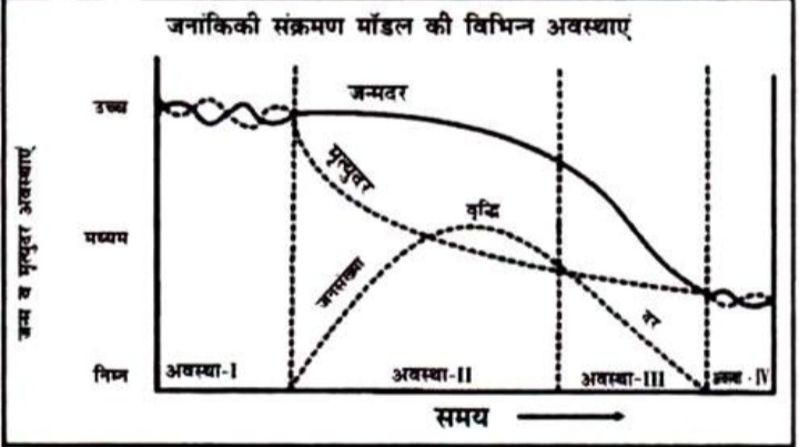 यह जनसंख्या सिद्धांत की पाँच अवस्थाएं दर्शाने वाला चित्र है।